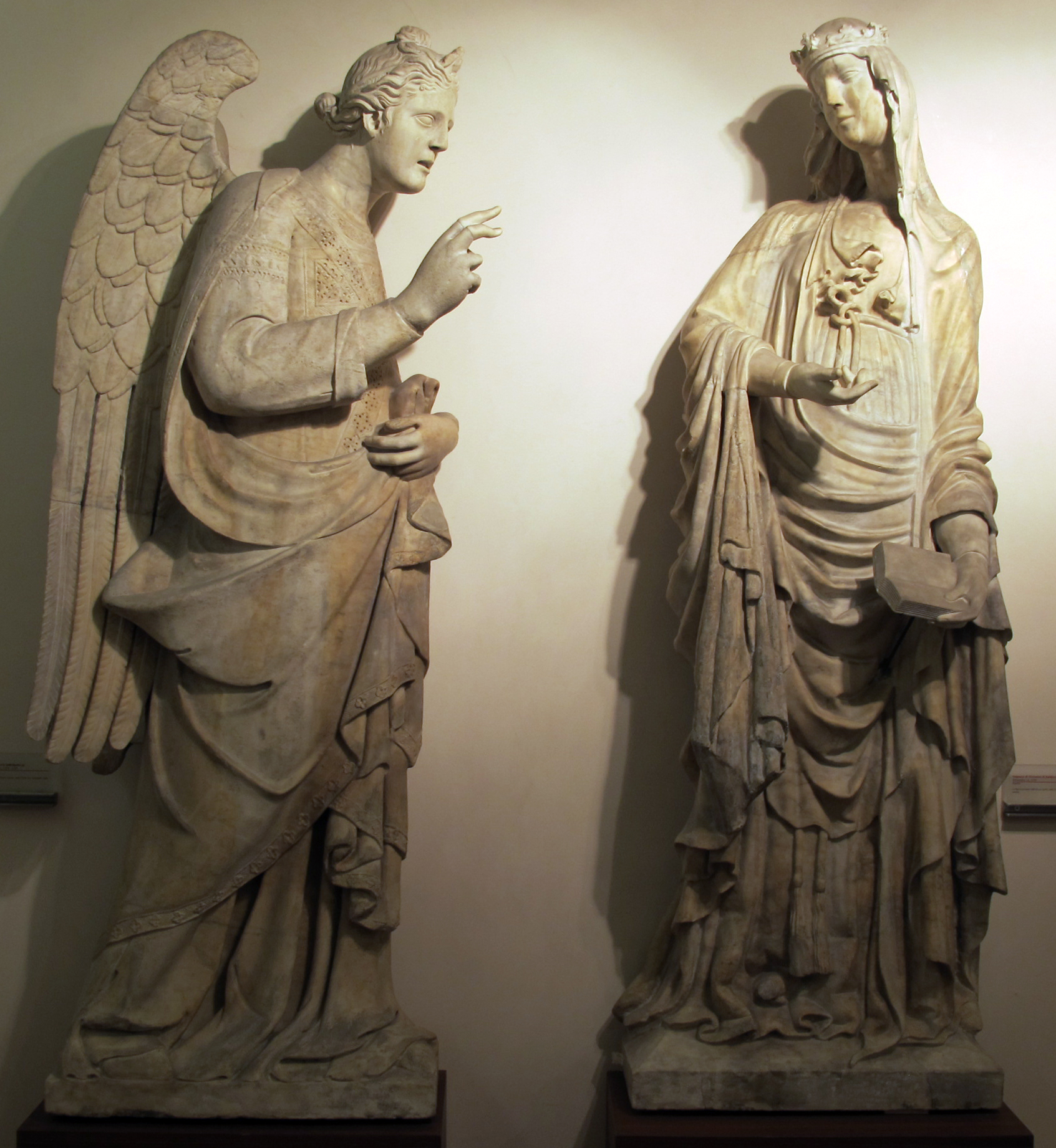 Giovanni di balduccio (seguace), annunziata